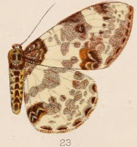 Abraxas leucostola ssp. argyrosticta Hampson 1893